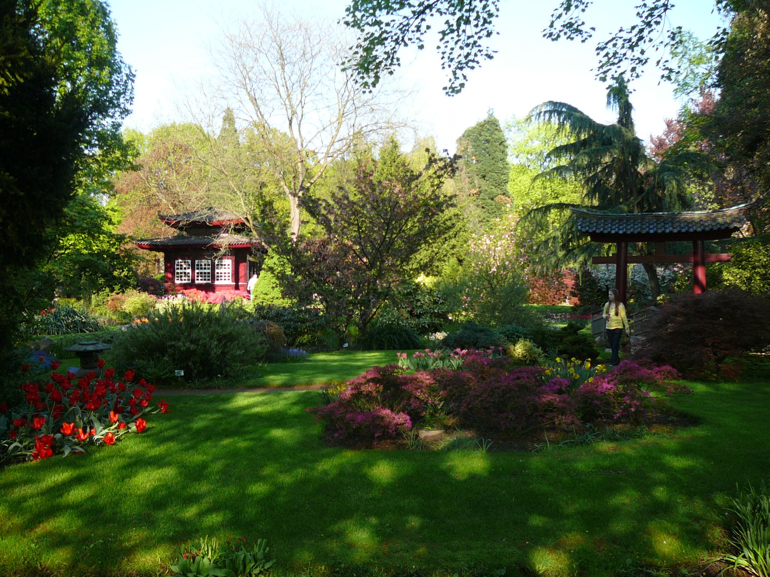 Carl-Duisberg-Park, Kaiser-Wilhelm-Allee, Leverkusen